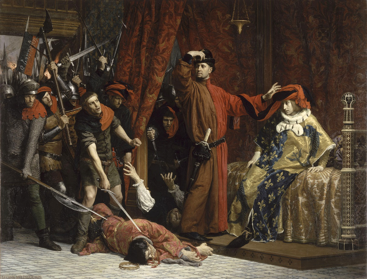 Lucien Etienne Mélingue, Le prévôt des marchands Étienne Marcel et le dauphin Charles, musée d'Orsay 1879.